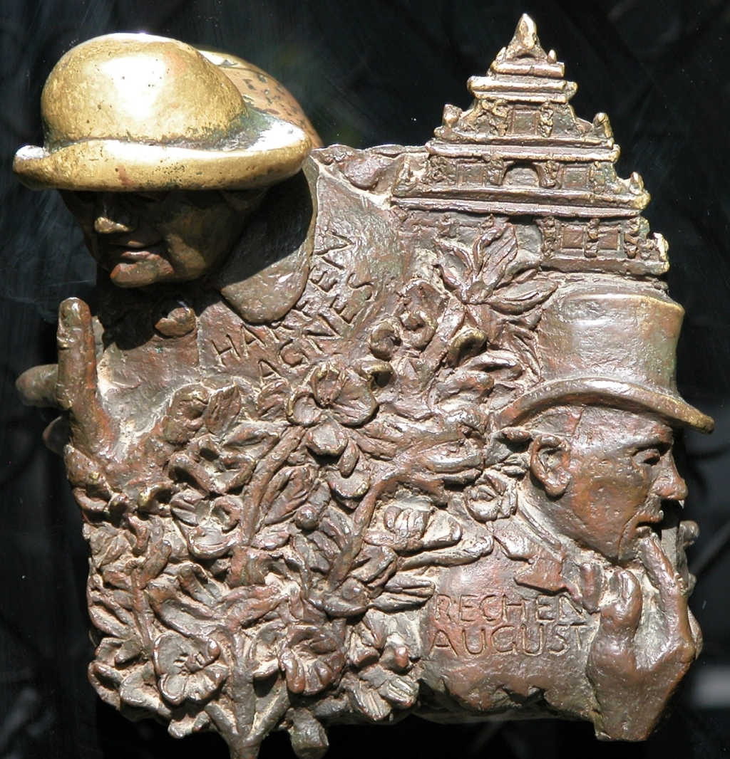 Türgriff am Braunschweiger Rathaus. Er zeigt zwei Braunschweiger Stadtoriginale: Harfen-Agnes (links oben) und Rechen-August (rechts unten). Im Hintergrund der Gewandhausgiebel.